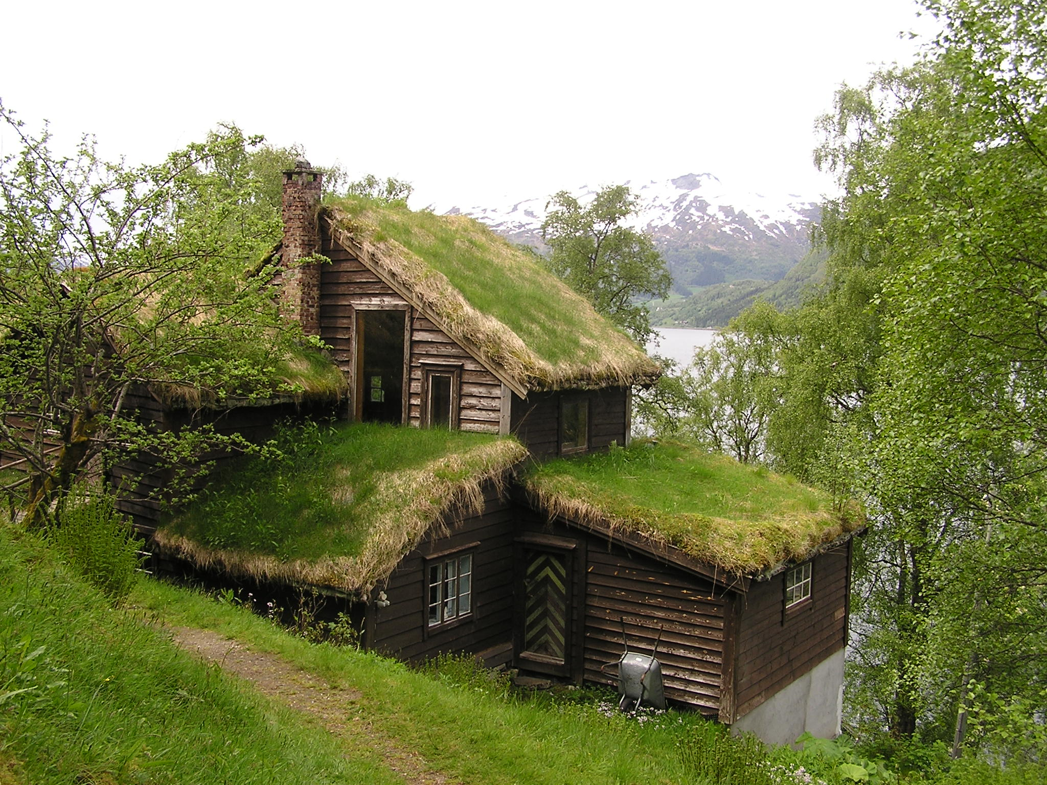 Astruptunet